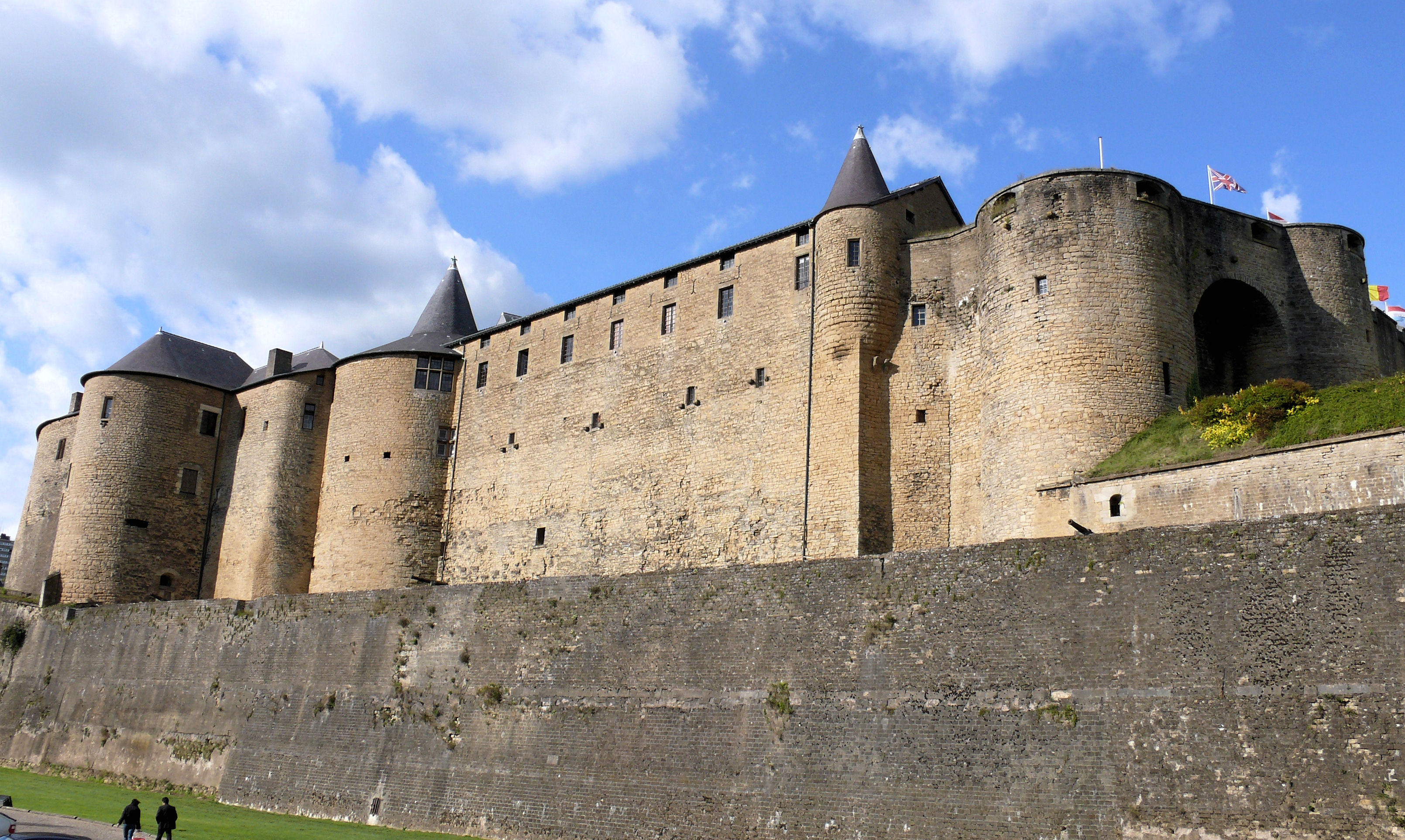 Sedan- Château - Tours jumelles, échauguette et Grosse tour